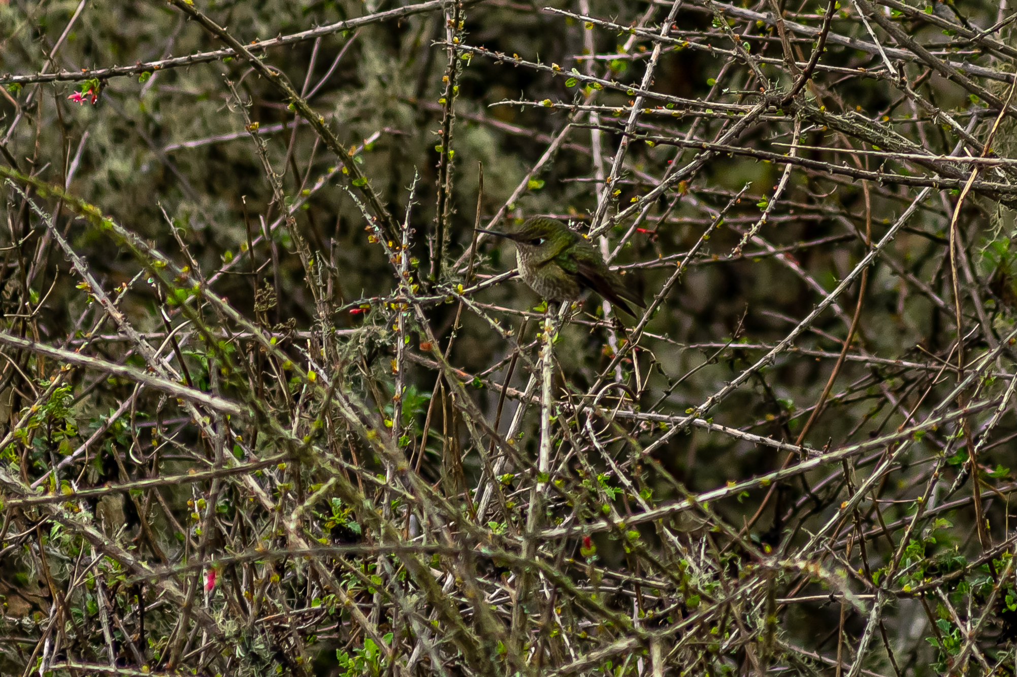 Picaflor Chico en el Parque Nacional Bosque Fray Jorge. Esta pequeña ave, de no más de 11 cm, vive desde Atacama hasta Tierra del Fuego. Se alimenta del polen y del néctar de las flores